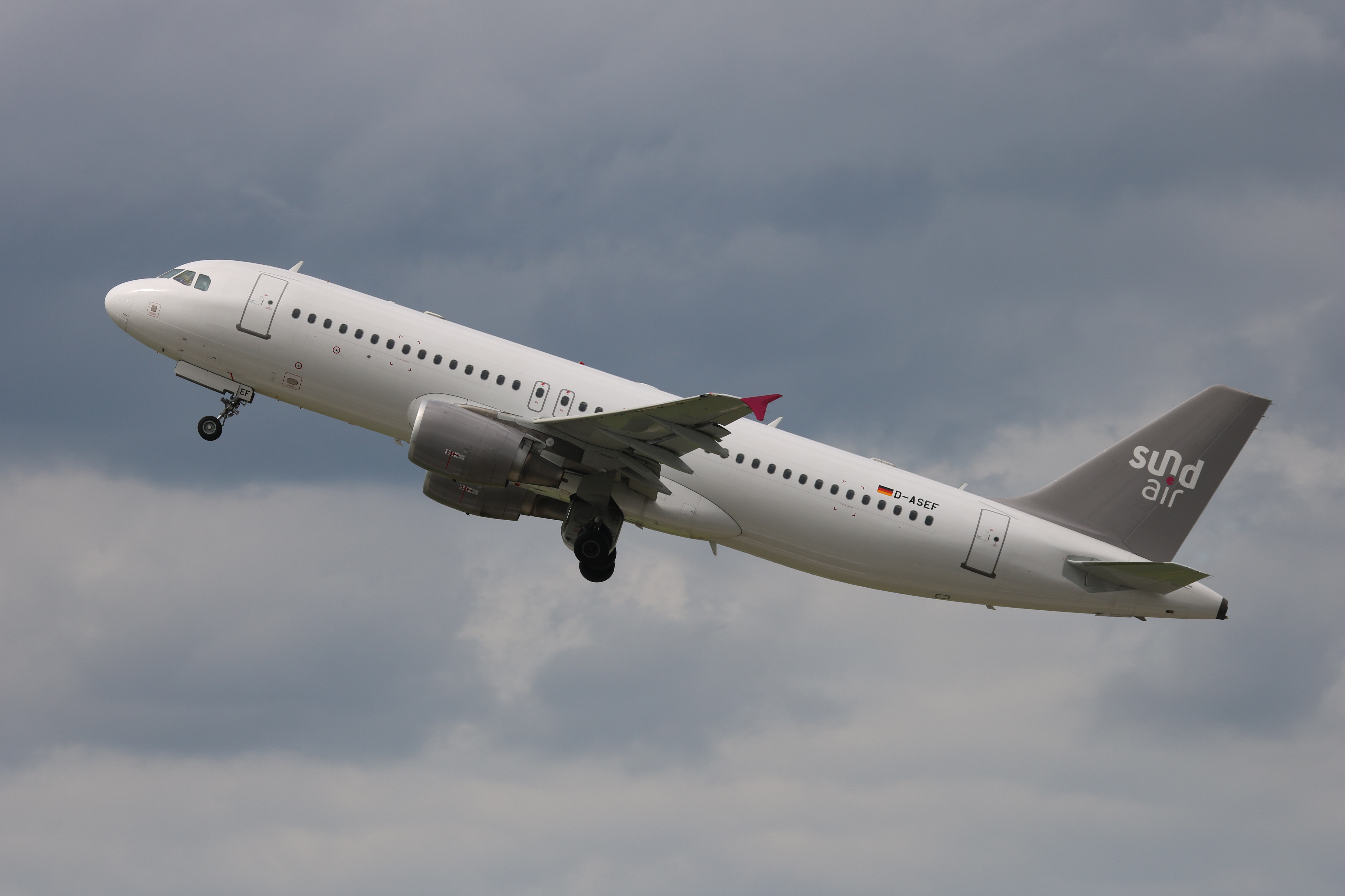 Flughafen Düsseldorf, Airbus A320-200 (D-ASEF) der Sundair